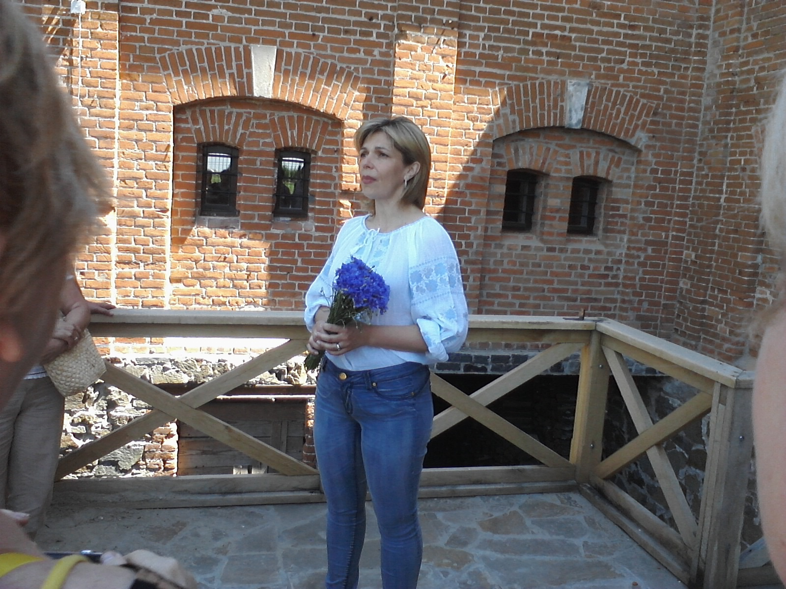 Историко-культурный комплекс "Замок Радомысль"